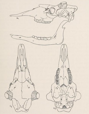 Sketch of moose skull.